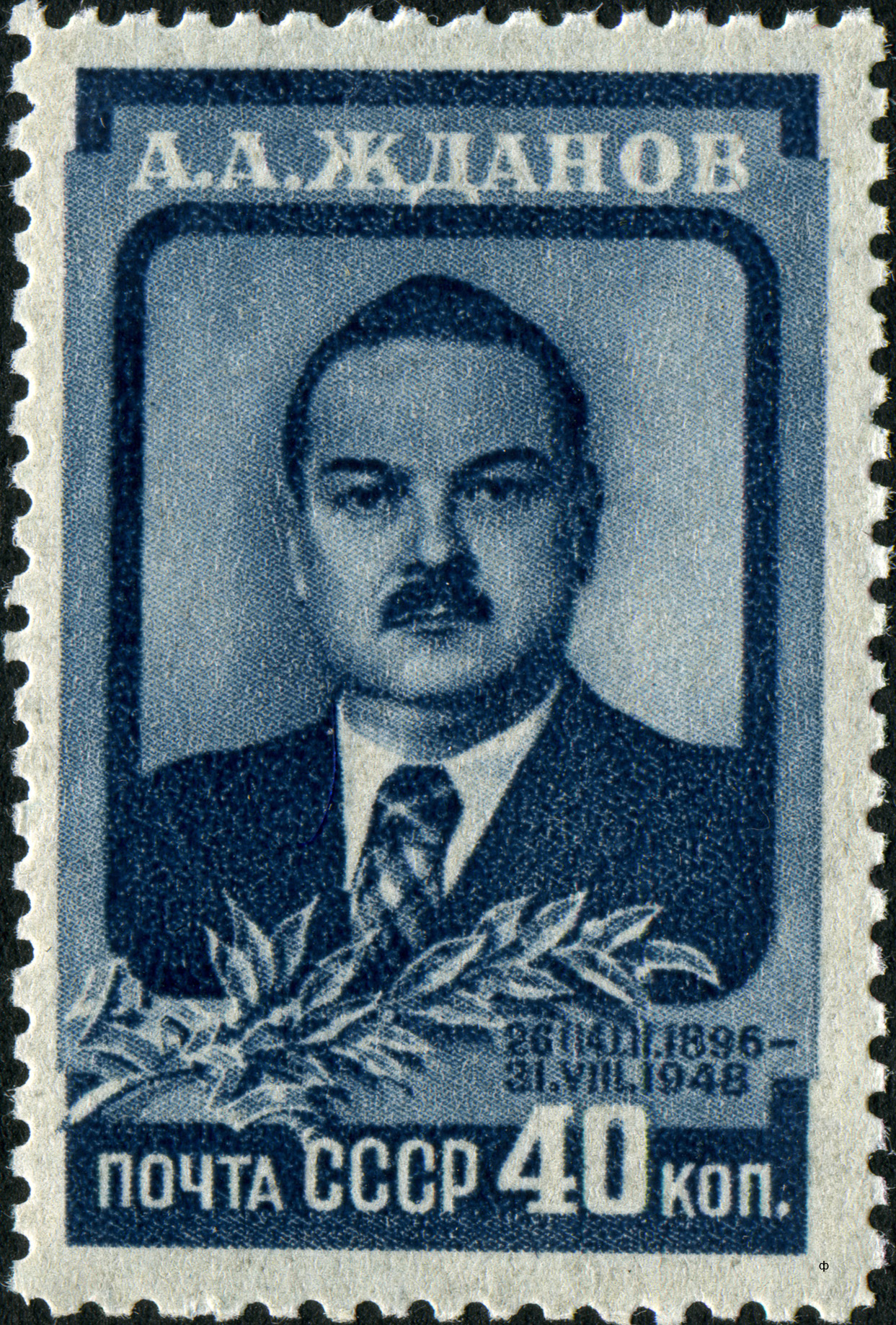 Марка СССР